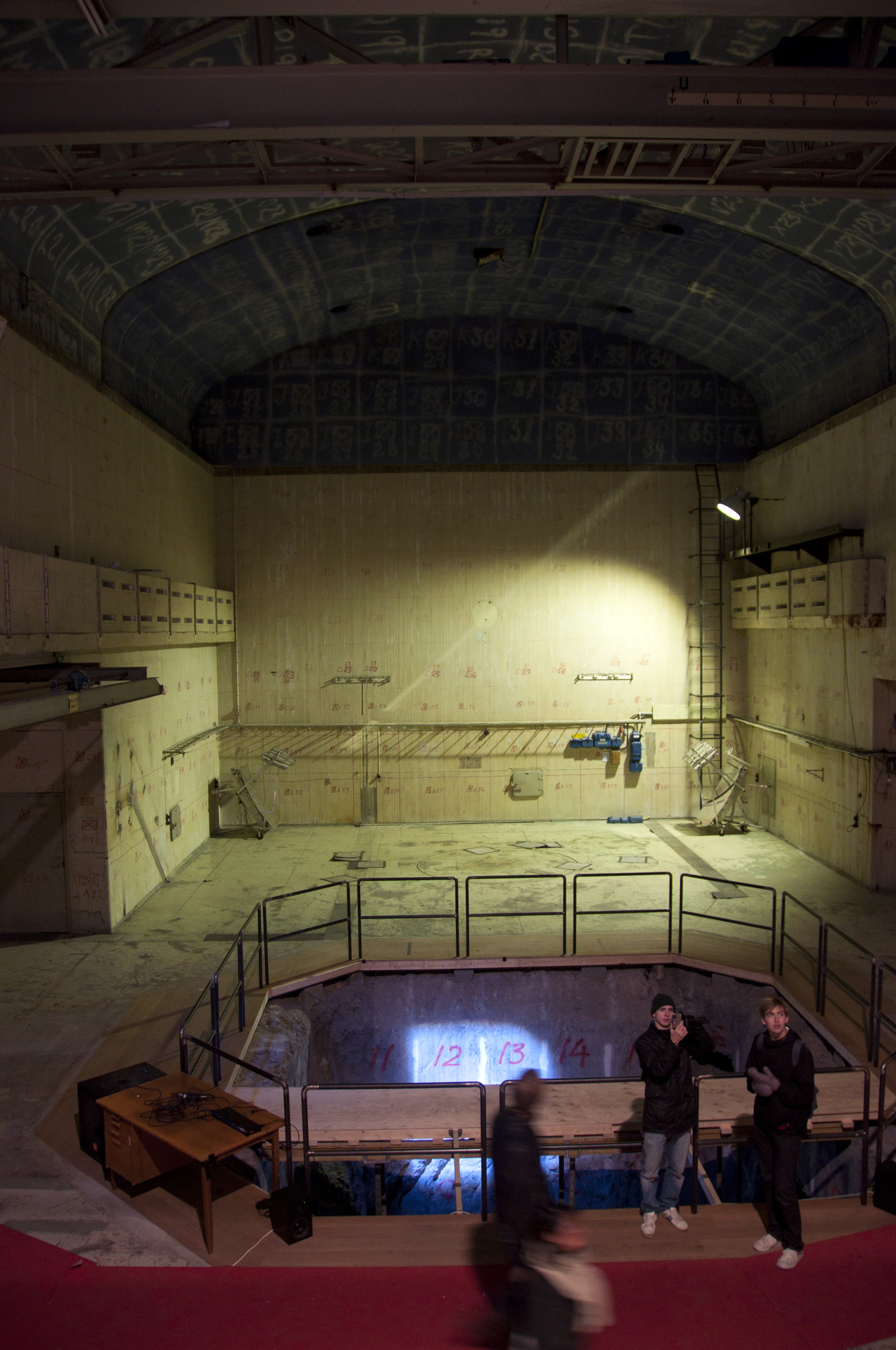 R1 Sveriges första kärnreaktor. Koordinaterna på tak och väggar från saneringen